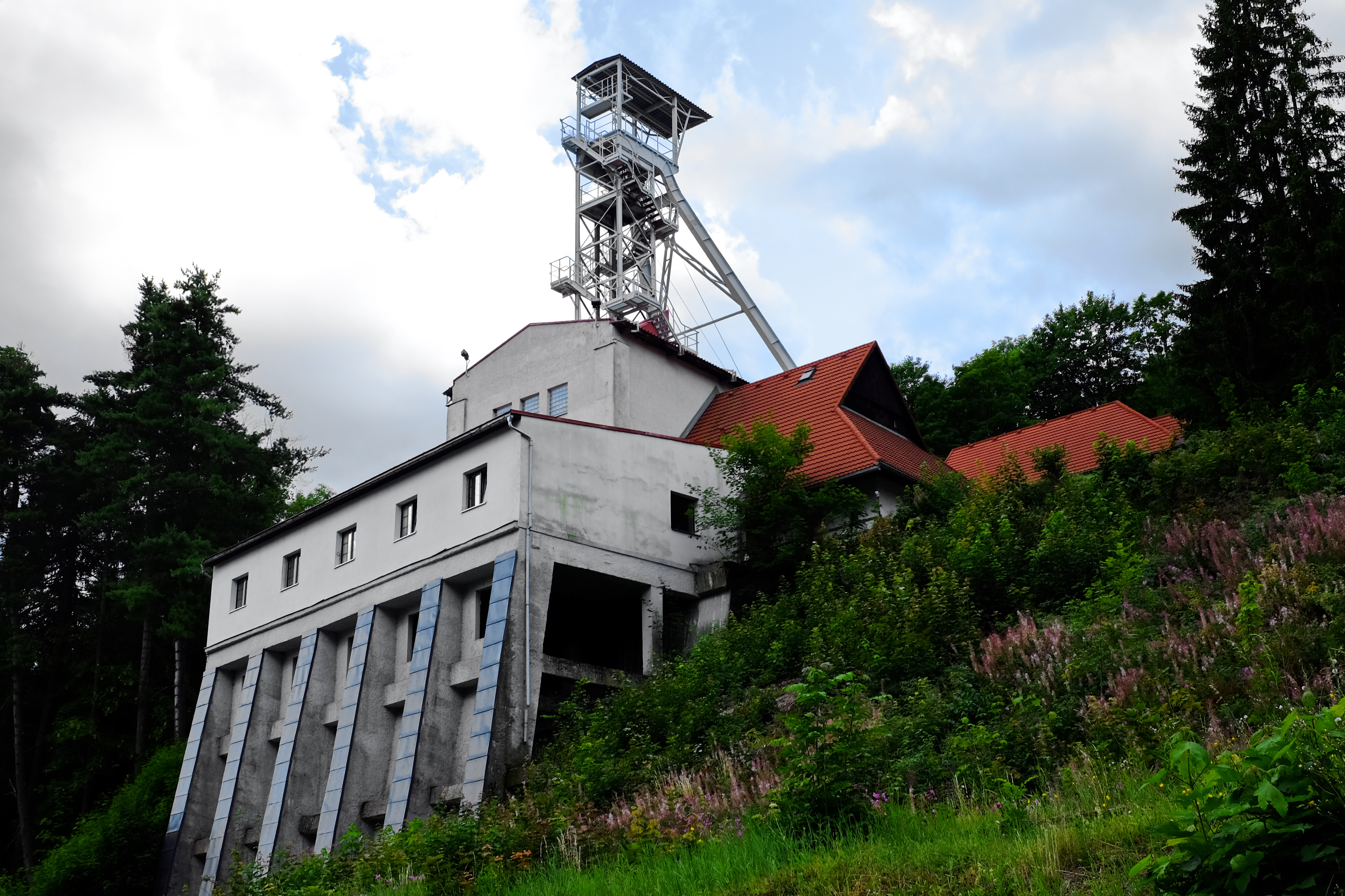 Jáchymov, těžní věž dolu Svornost